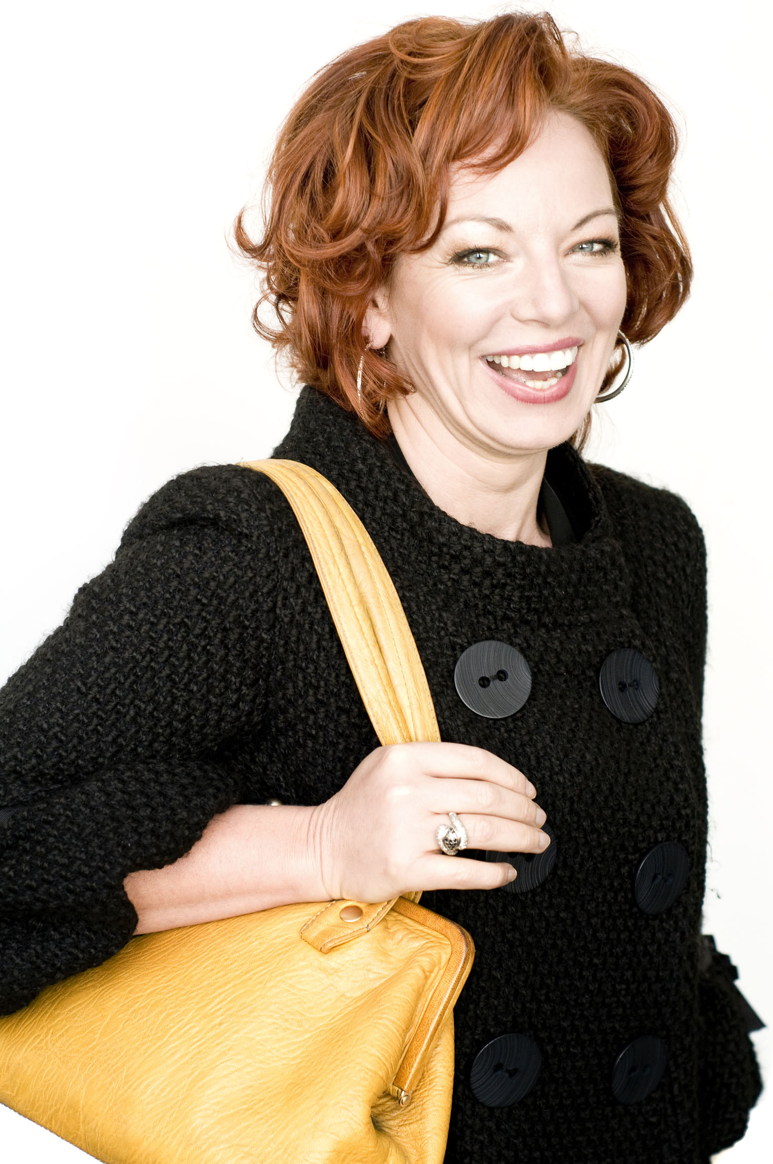 Els de Schepper, Vlaamse actrice, cabaretière en schrijfster.